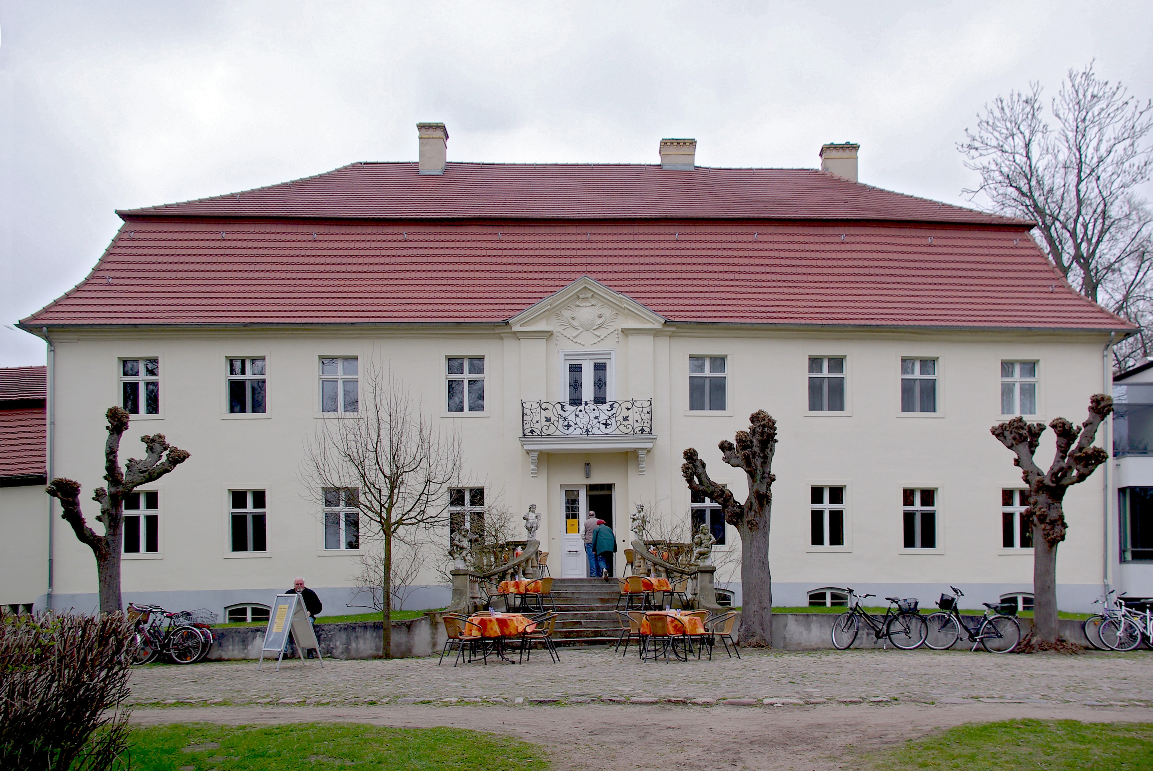 Trebbin Ortsteil Blankensee. Das Gutshaus oder Sudermannschloss. Im Haus gibt es ein Sudermannzimmer.